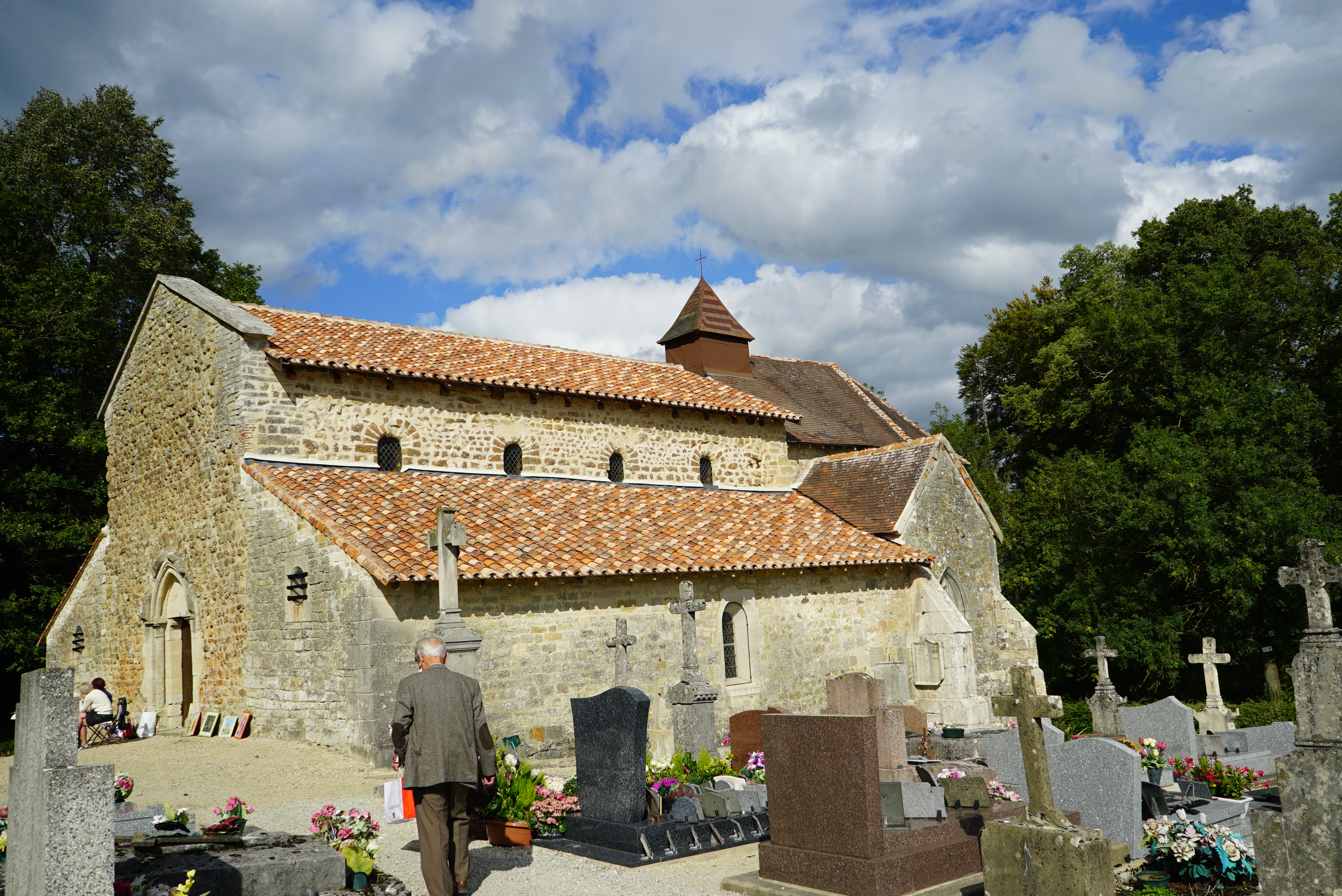 Chapelle Saint-Aubin de Moëslains .